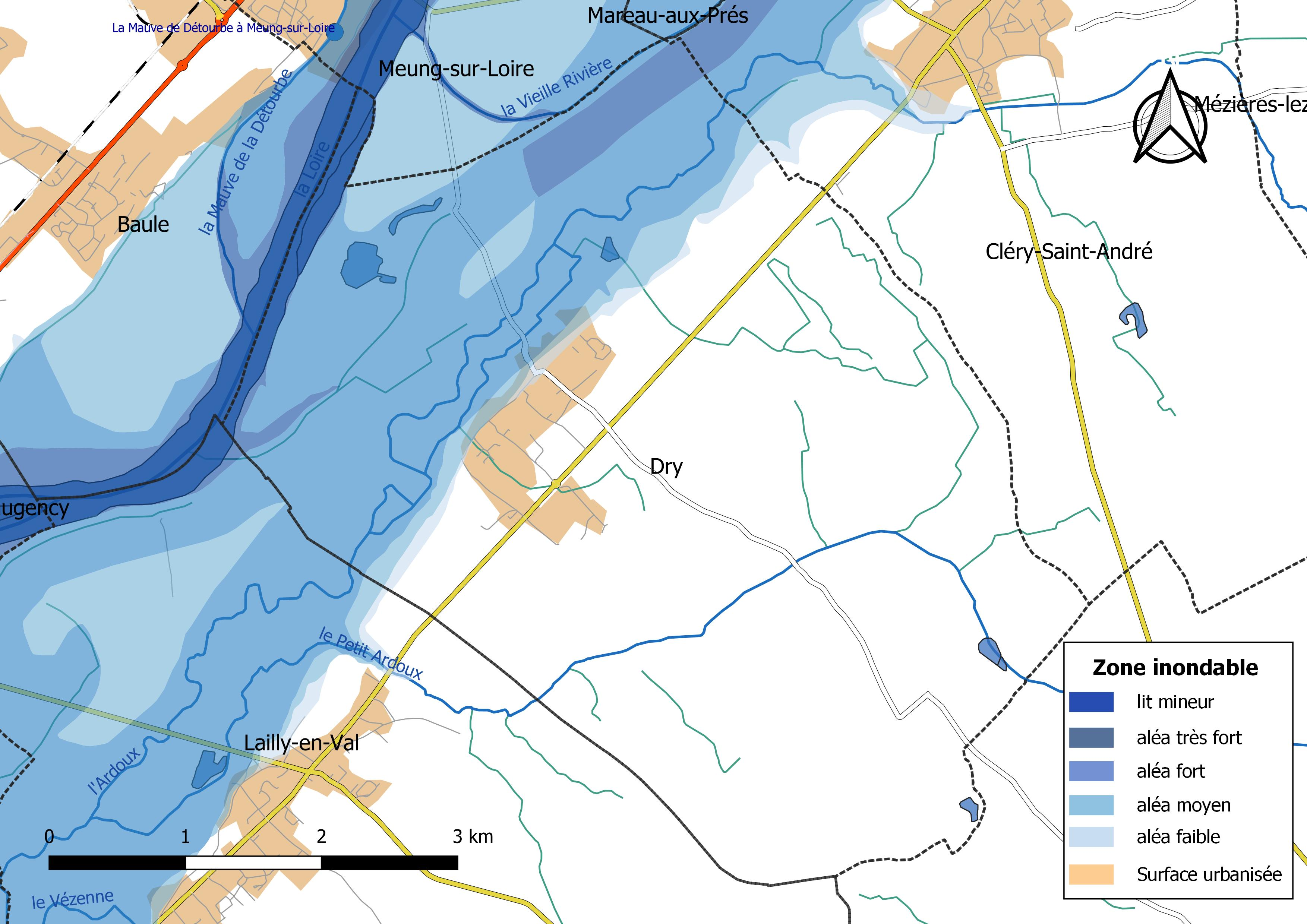 Zone inondable et réseaux hydrographique et routier de la commune de Dry (Loiret, France).